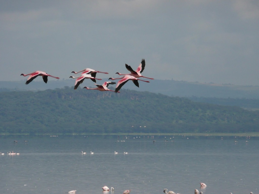 Flamant nains roses au lac nakuru (Kenya)